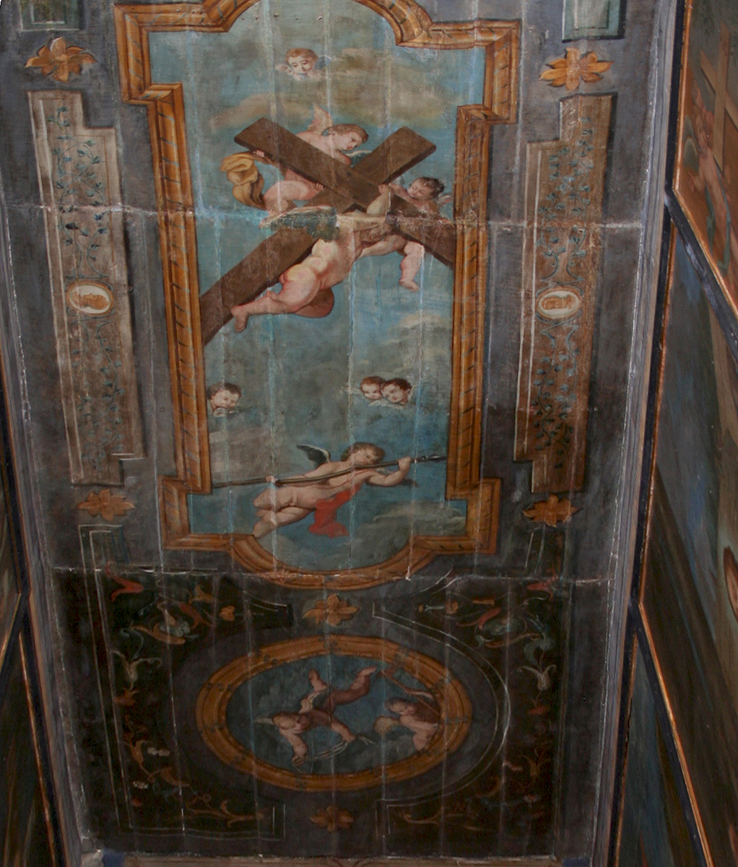 Particolare degli angeli che stringono la croce, simbolo del martirio di Gesù, dipinti sul soffitto ligneo della Scala di ascesa della Scala Santa di Campli.